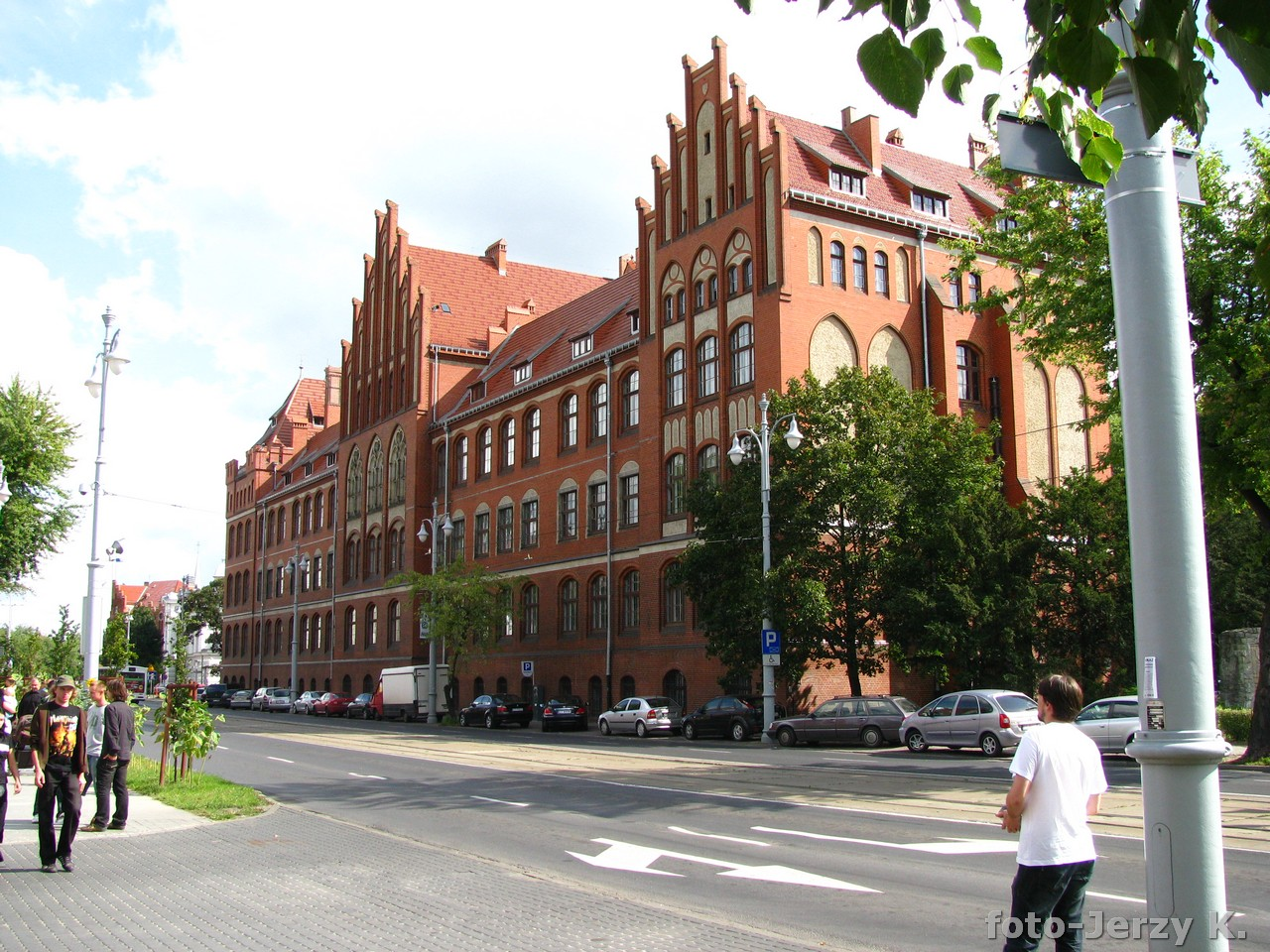 Wały Gen.Sikorskiego (UMK)